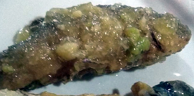 Tinca Gobba Dorata del Pianalto di Poirino DOP - praparazioone in carpione